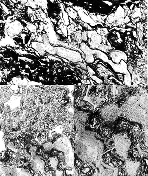 Esami sulla mummia di Cangrande della Scala